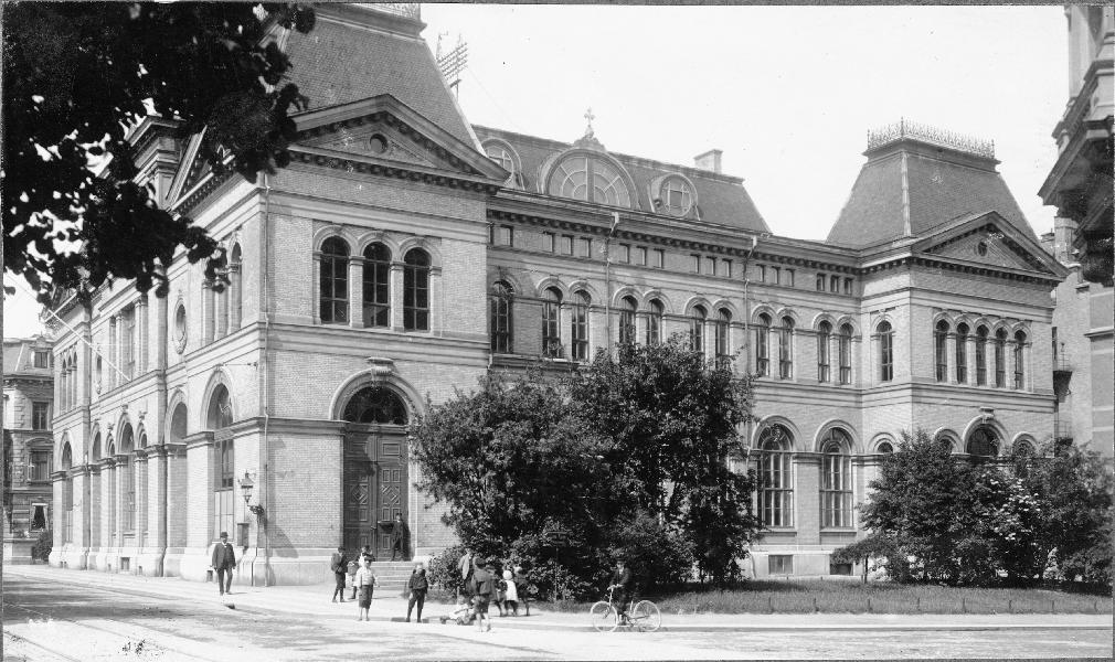 Kyrkans fasad mot torget. Invigd 1881, riven 1963. Ritad av J.A. Westberg. Foto för tidningen Hemmet. Kategori: (01) ExteriörerKyrkans fasad mot torget. Invigd 1881, riven 1963. Ritad av J.A. Westberg. Foto för tidningen Hemmet.